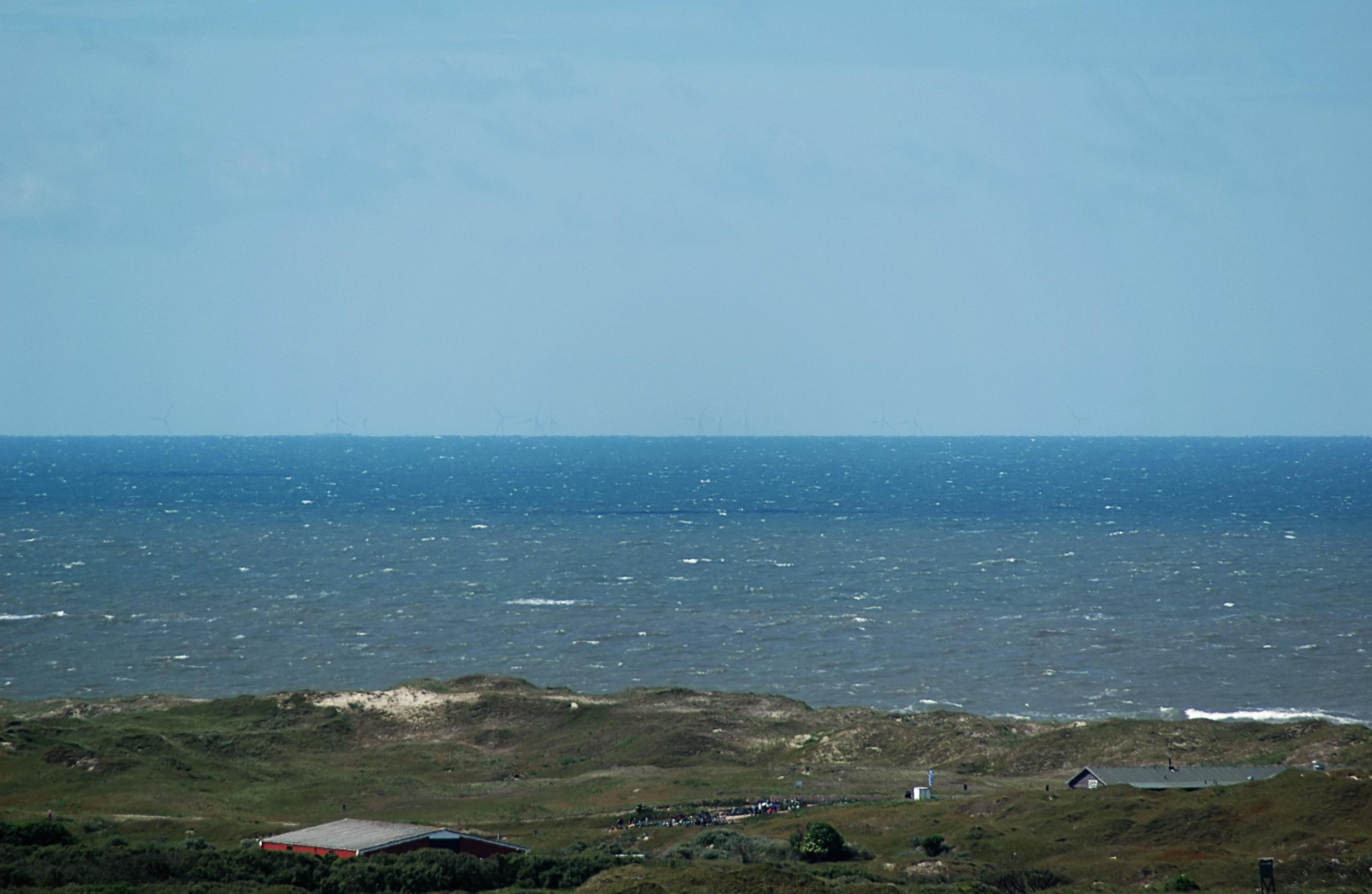 Der Windpark alpha ventus vom Leuchtturm Norderney fotografiert